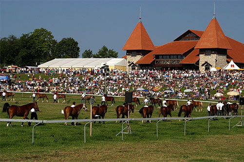 Marché-Concours 2004: Vorführung der Zuchthengste (Freiberger)